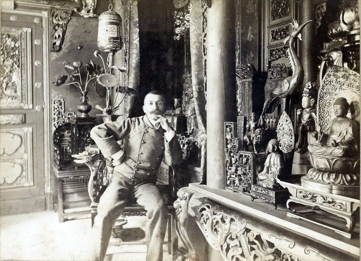 Pierre Loti chez lui dans sa pagode par Dornac Salle dite "La Pagode japonaise". Plus d'informations: [1]